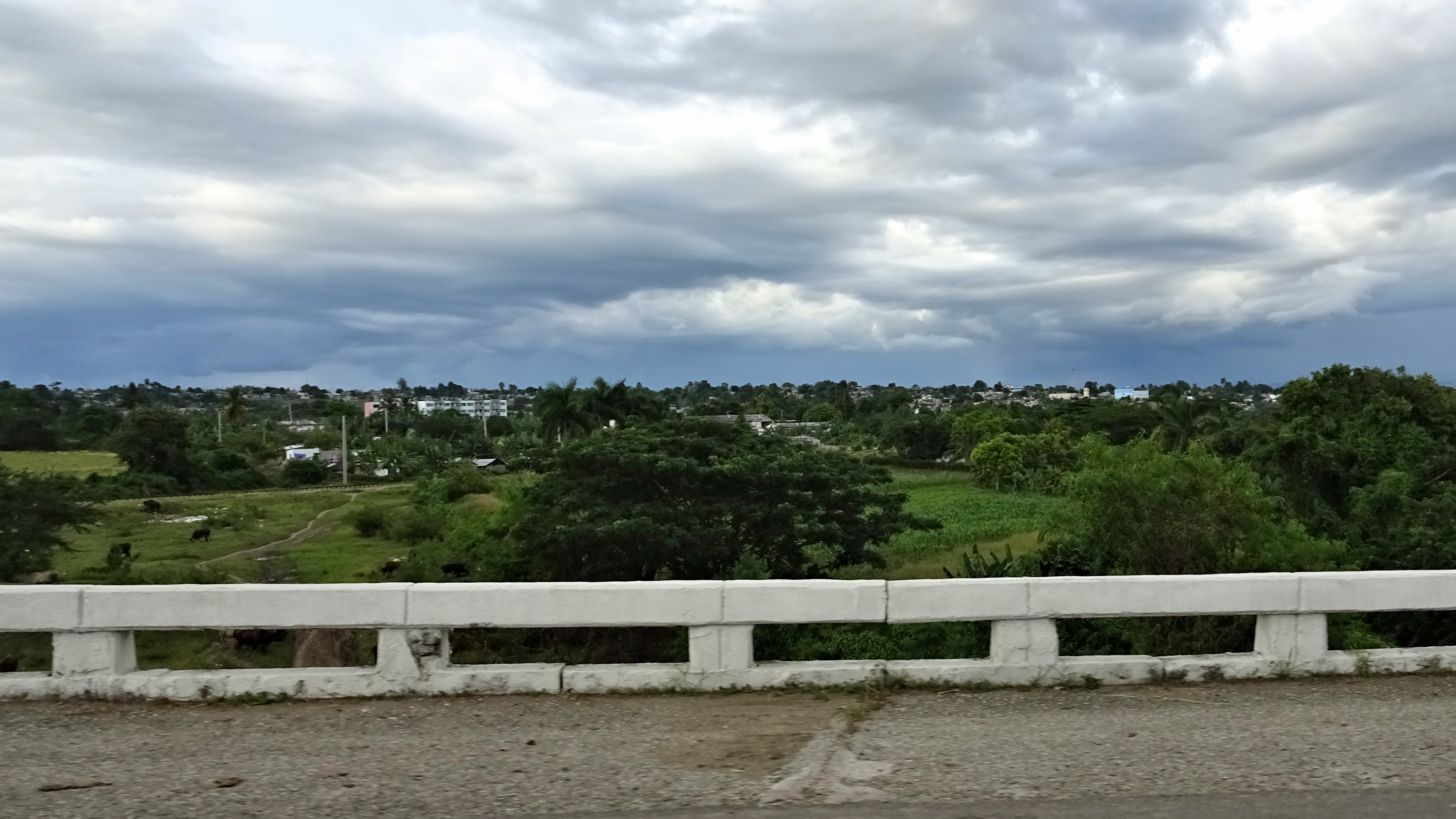 San Luis, Santiago de Cuba Province, Cuba